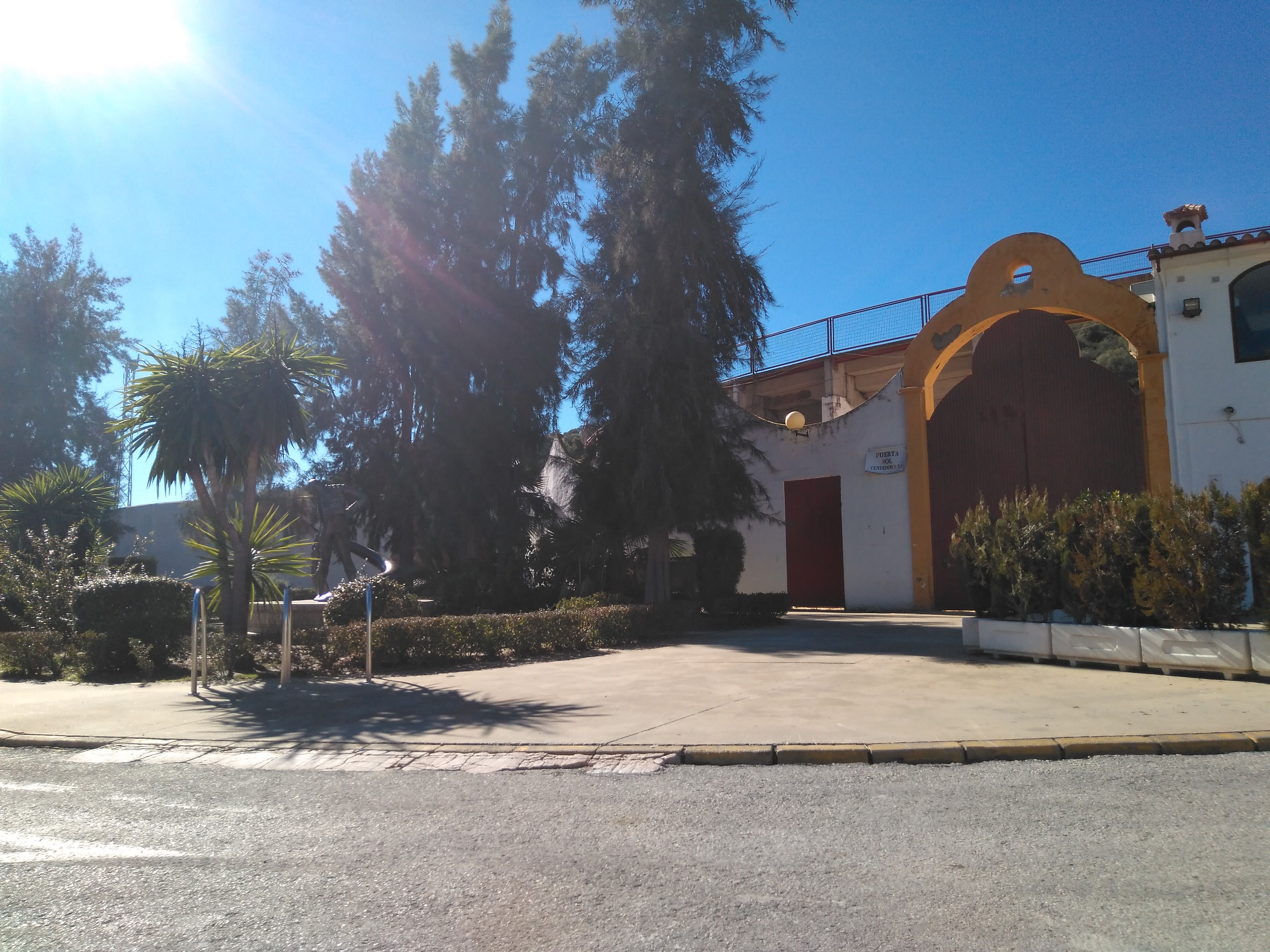 plaza de toros de Ubrique con monumento a "Jesulín de Ubrique" en la entrada